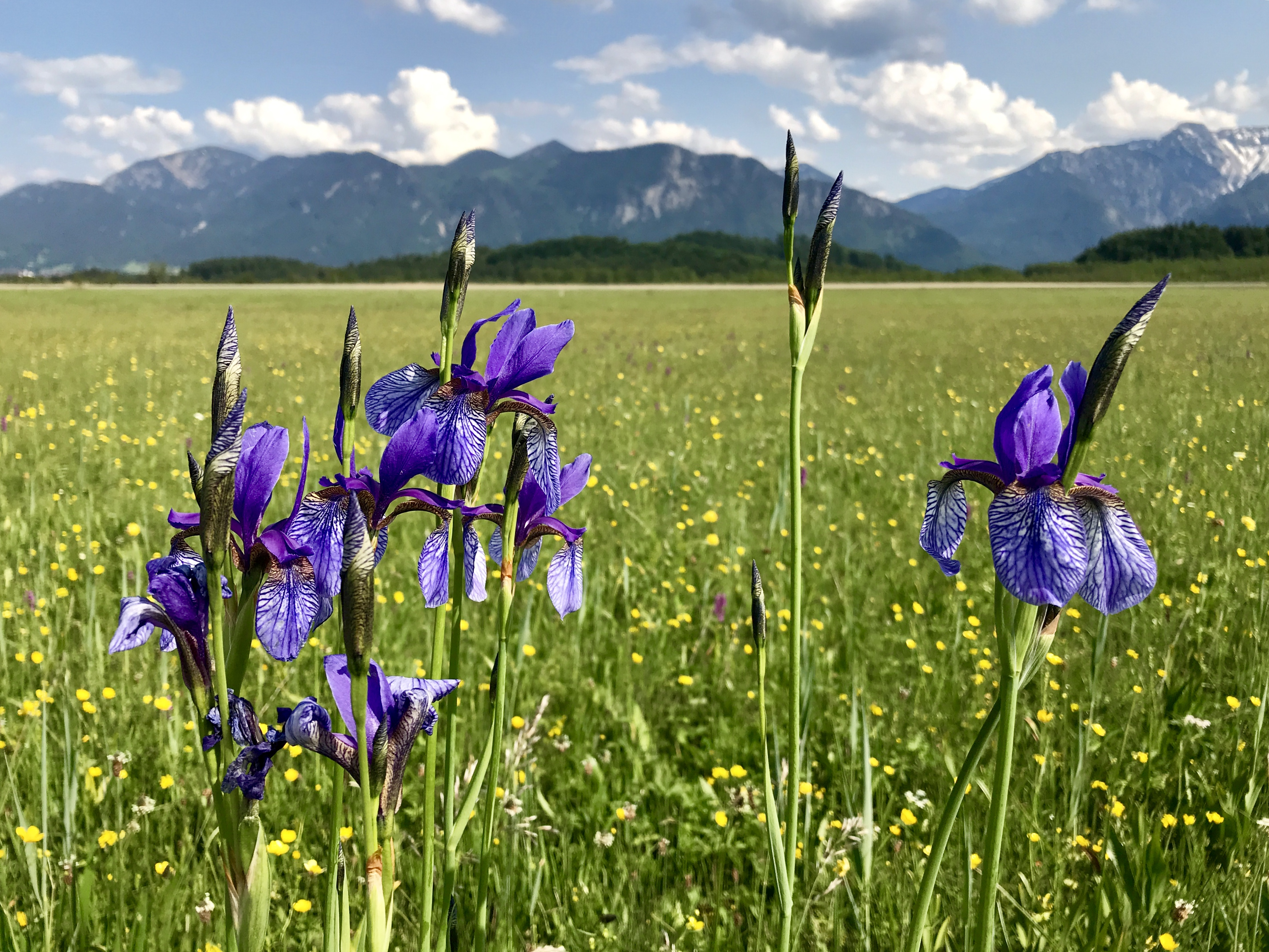 Die Sumpfschwertlilie ist eine geschützte Pflanzenart im größten noch erhaltenen Hochmoor Mitteleuropas.